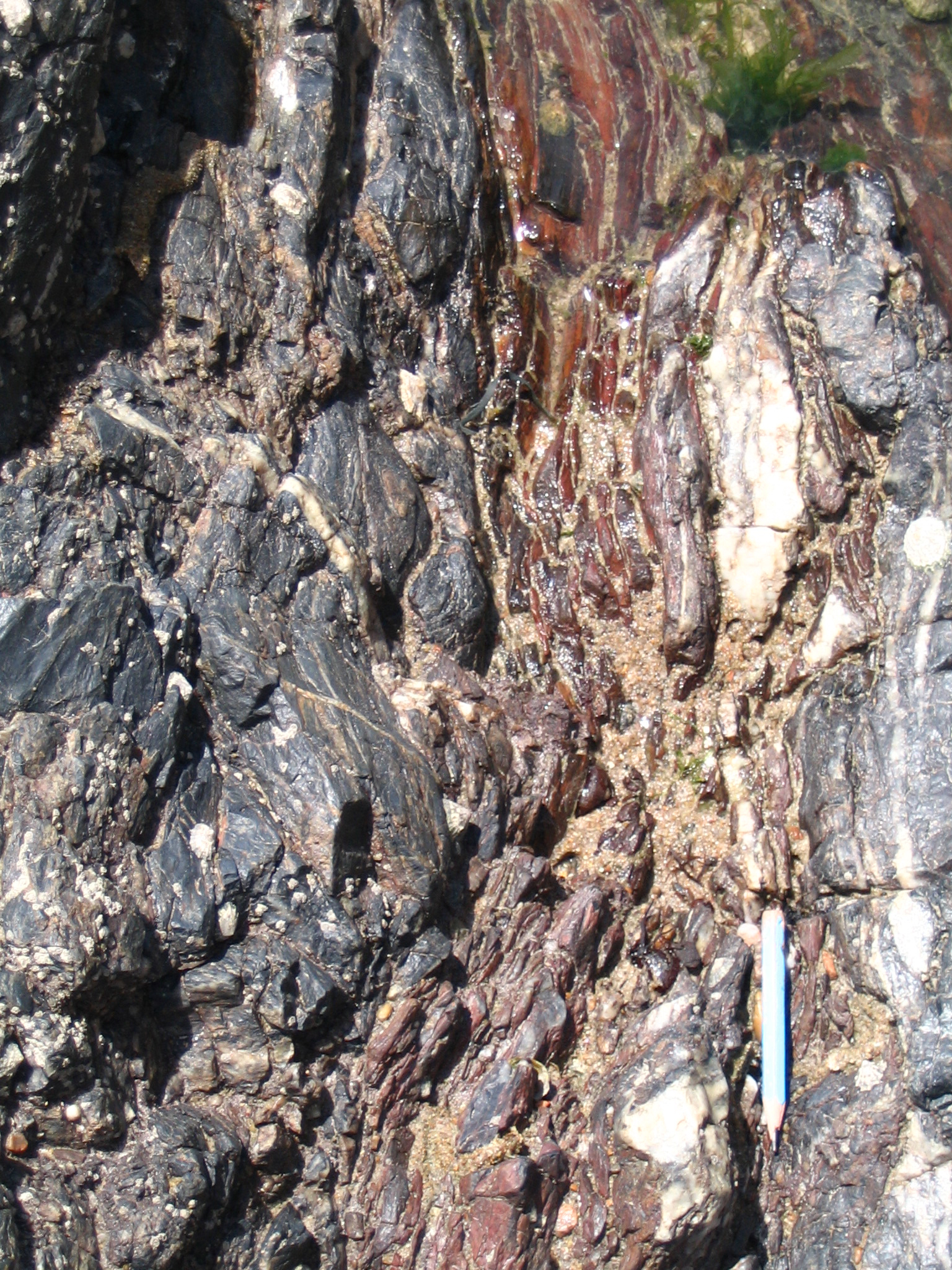 Rocher Ste Véronique, estran de Brétignolles, Vendée, F. gros plan des phtanites constituant ce rocher